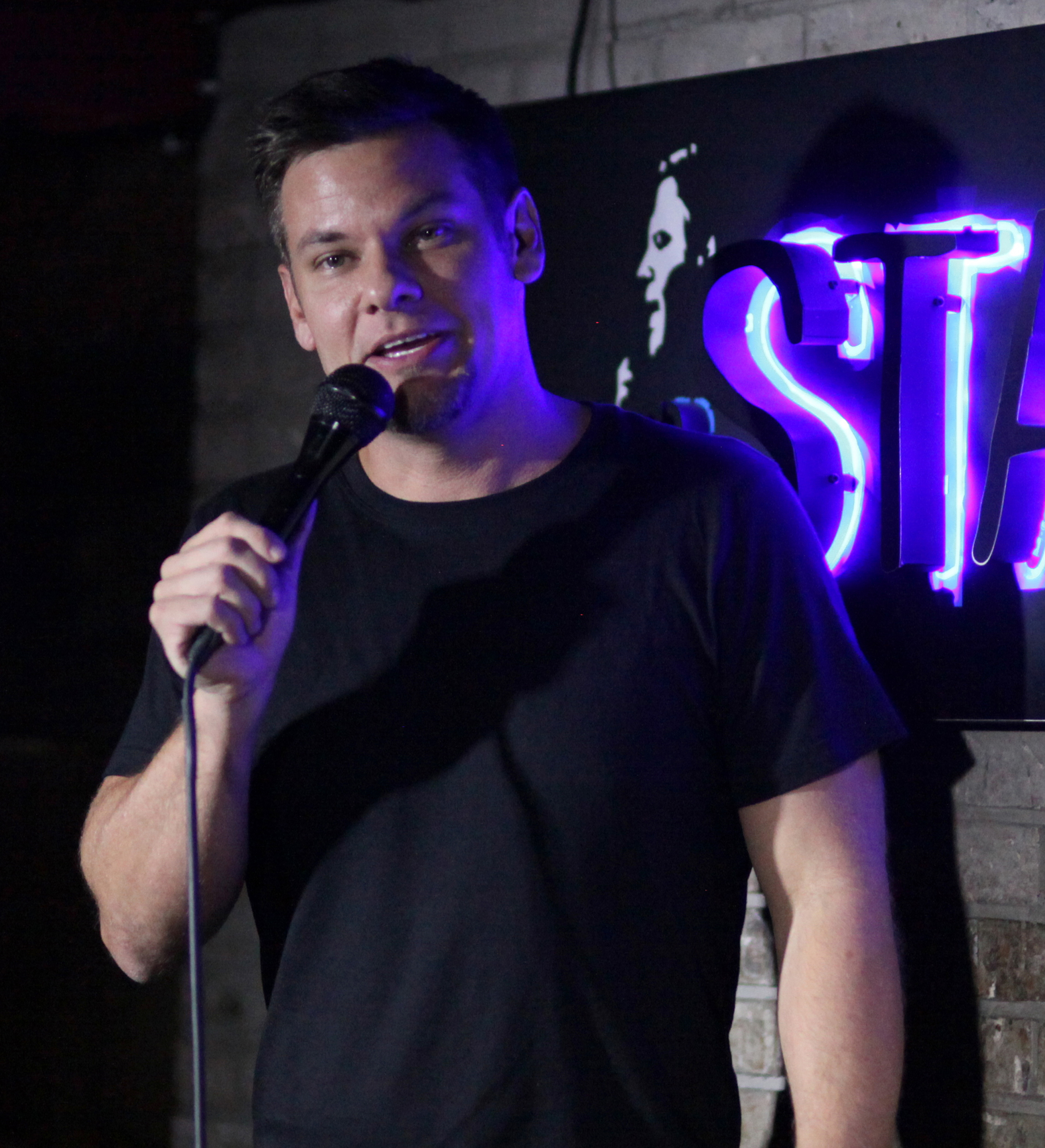 Von in August 2016.